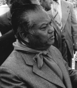 Factual corrections and alternative descriptions are encouraged separately from the original description. Additionally errors can be reported at this page to inform the Bundesarchiv. Original historic description: LPG Satzkorn-Fahrland, Besuch von Kaysone Phomvihane ADN-ZB Mittelstädt 21.9.82 Bez. Potsdam: Phomvihane-Besuch- Die Partei- und Staatsdelegation der VDRL unter Leitung von Kaysone Phomvihane (l.), Generalsekretär des ZK der Laotischen Revolutionären Volkspartei und Vorsitzender des Ministerrates der VDRL, besuchte die LPG Obstproduktion Satzkorn-Fahrland. In der Obstplantage kam es dabei zu herzlichen Gesprächen mit Werktätigen.